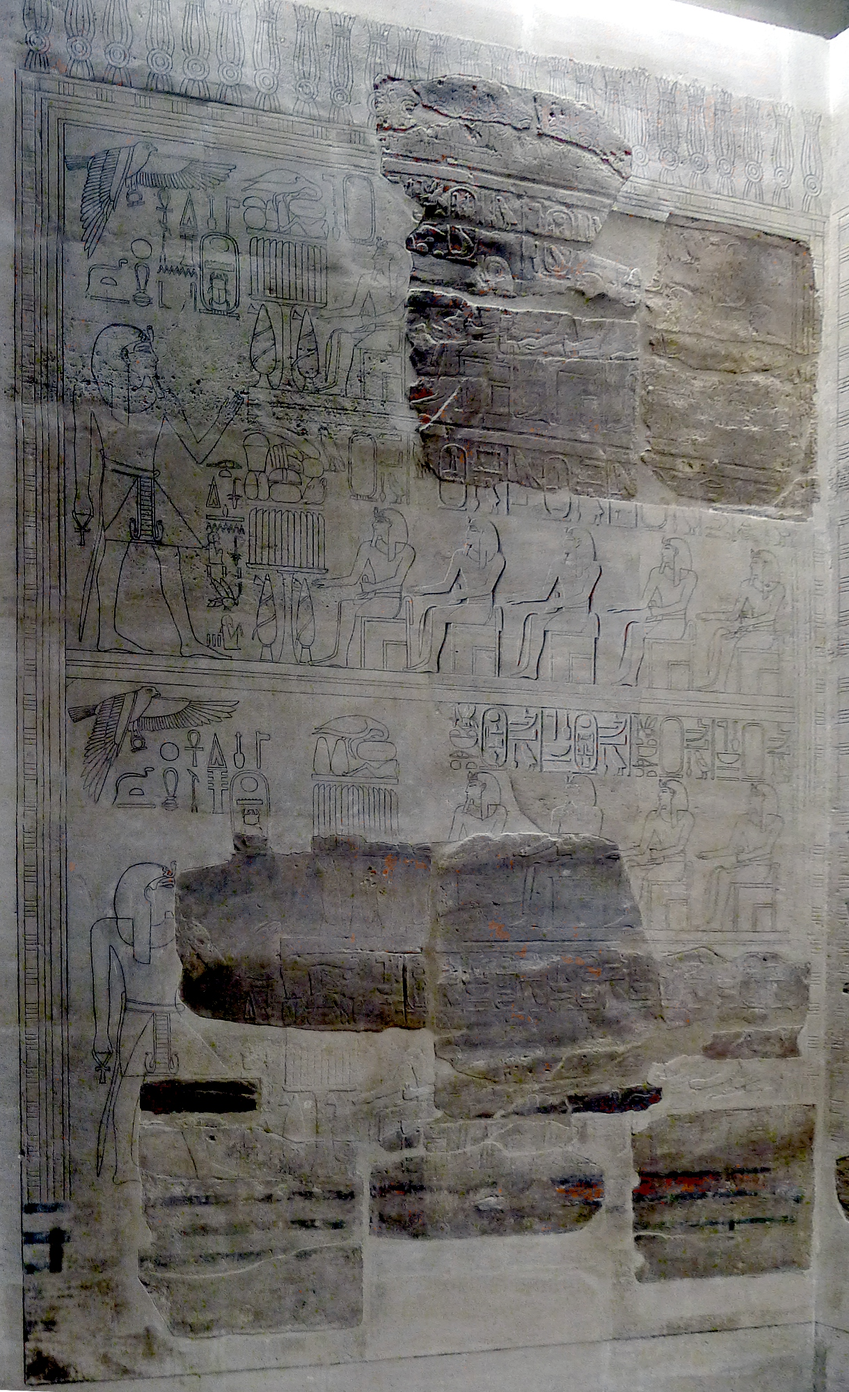 Chapelle des Ancêtres, volet 1.